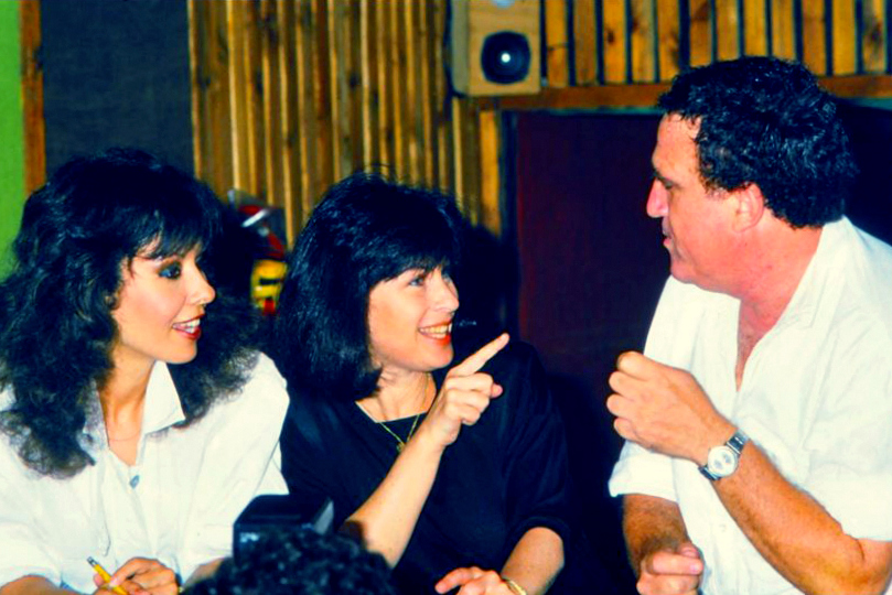 יהורם גאון נורית הירש וירדנה ארזי בעת הקלטת השיר "אדם אחר"